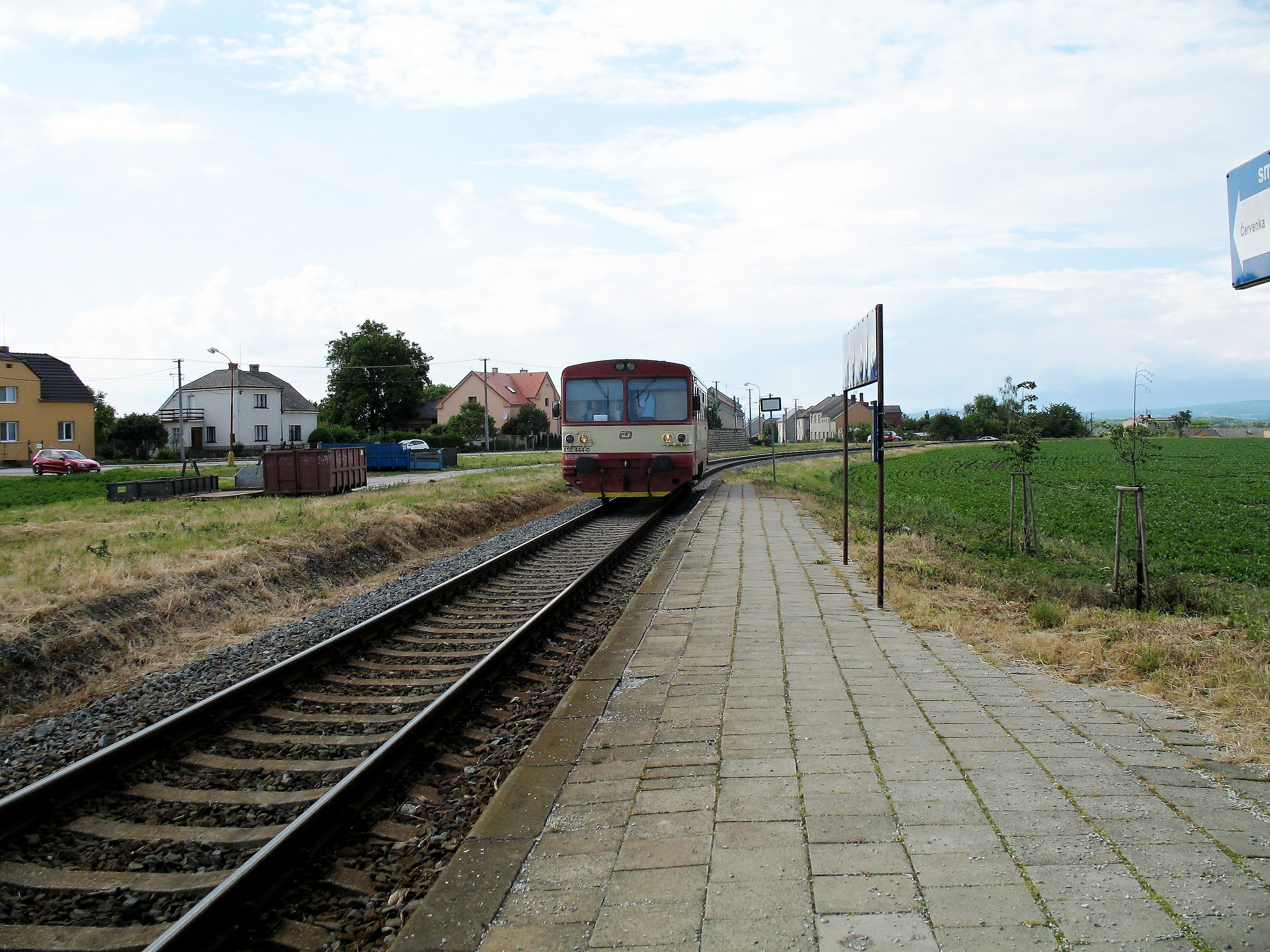 Myslechovice na trati č. 273. Do zastávky přijíždí vlak z Litovle předměstí, který pokračuje do Prostějova